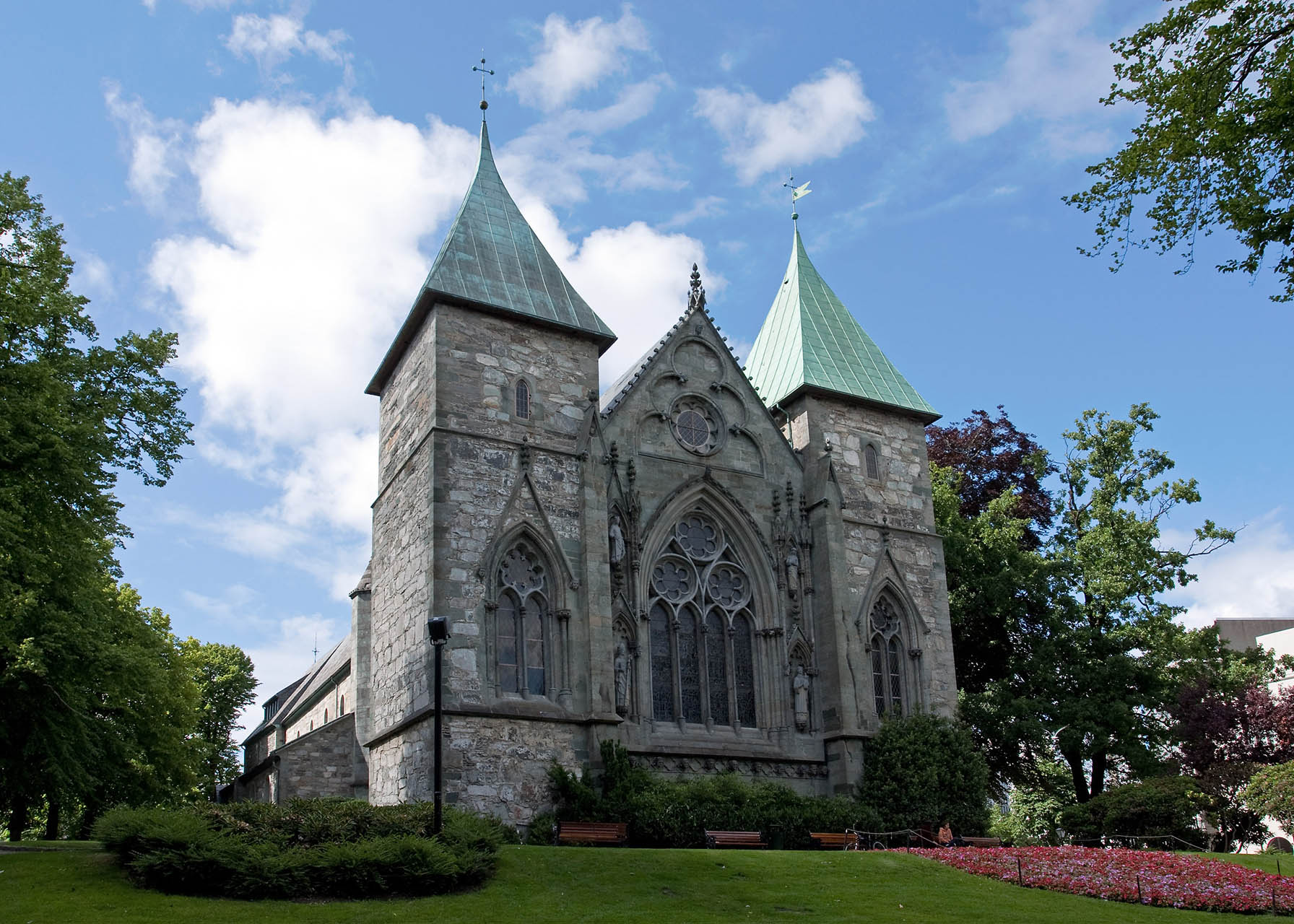 Dom / Stavanger, Norway